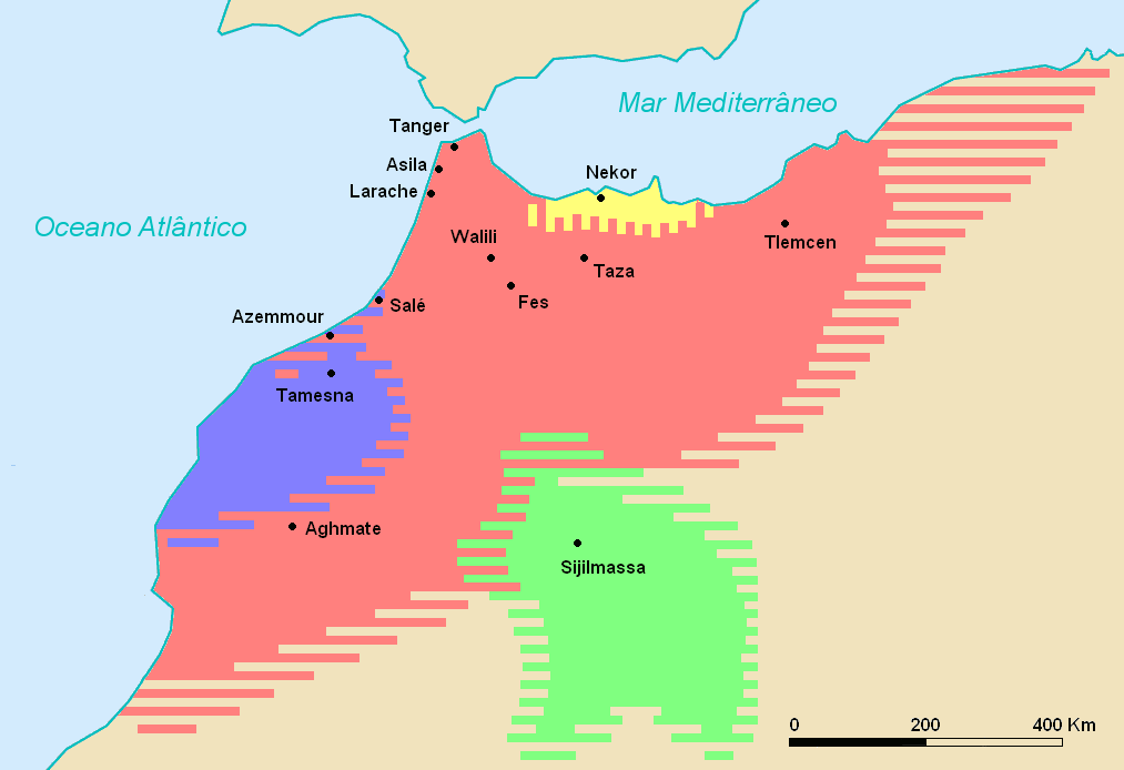 Carte du Maroc pdt. l'ere idrisside. Travail basé essentiellement sur: - les cartes d'Euratlas [1][2] - les travaux de Shepherd [3]. - la description du partage du royaume entre les héritiers d'Idriss II en 828 [4][5][6].